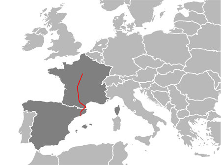 European route E9